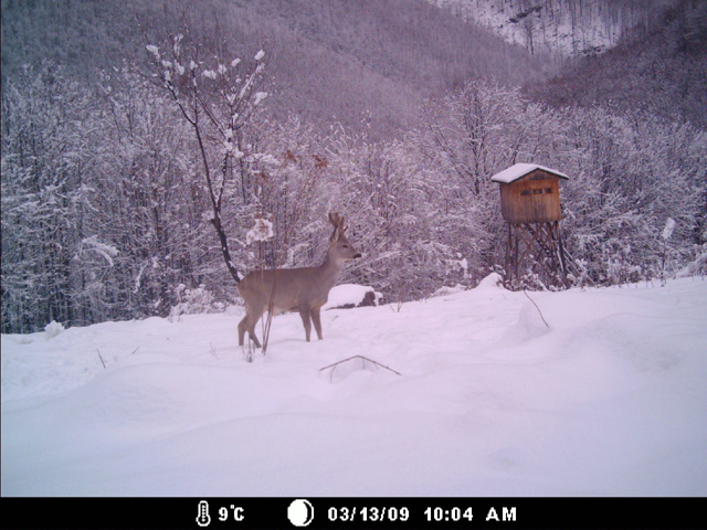 Сърничка заснета с ловна камера Moultrie I45